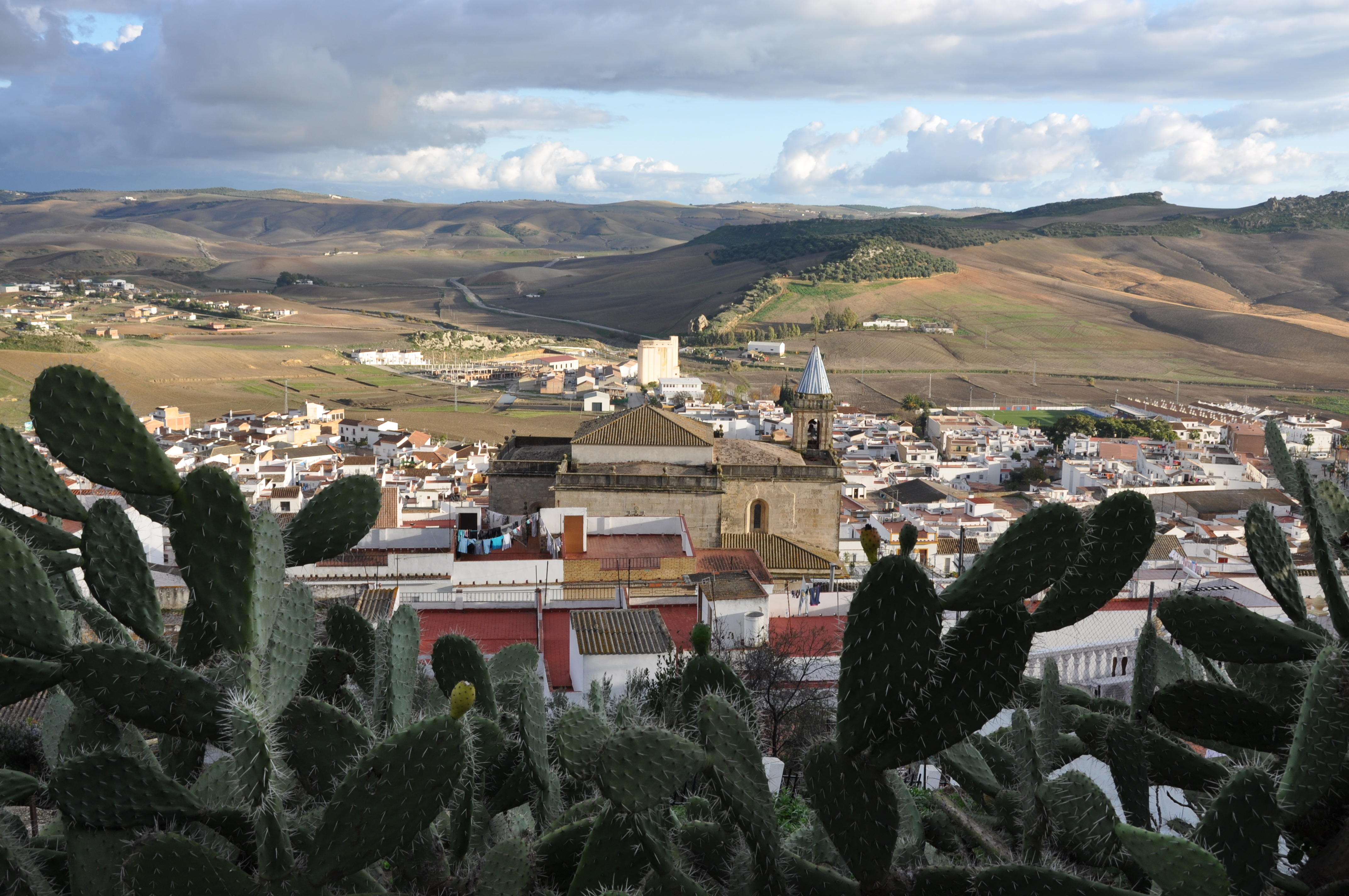 Espera-dsc 0251.jpg